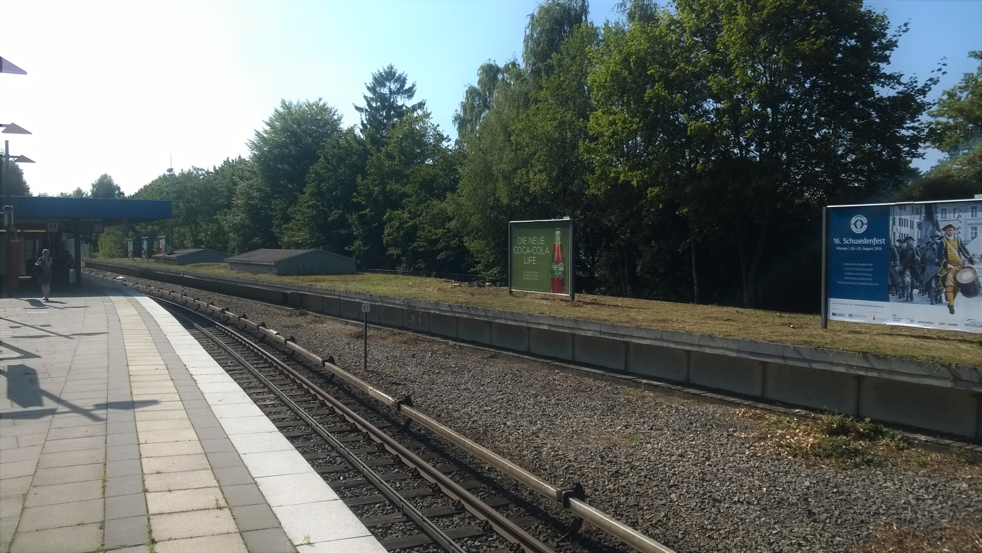 Nie in Betrieb genommener Bahnsteig des U-Bahnhof Sengelmannstraße. Vorleistung für die U4 (alt) und ggf. nutzbar für die U5 (geplant)